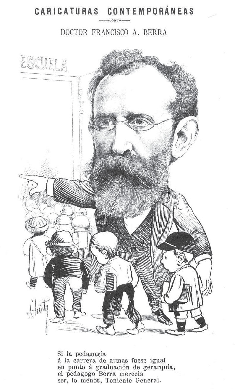 Caricatura del escritor y pedagogo uruguayo Francisco Berra, aparecido en la portada de la revista Caras y Caretas n64 del 4 de octubre de 1891